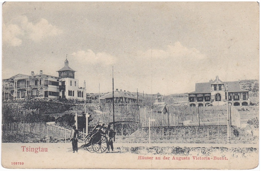 青岛总督临时官邸及总督副官官邸